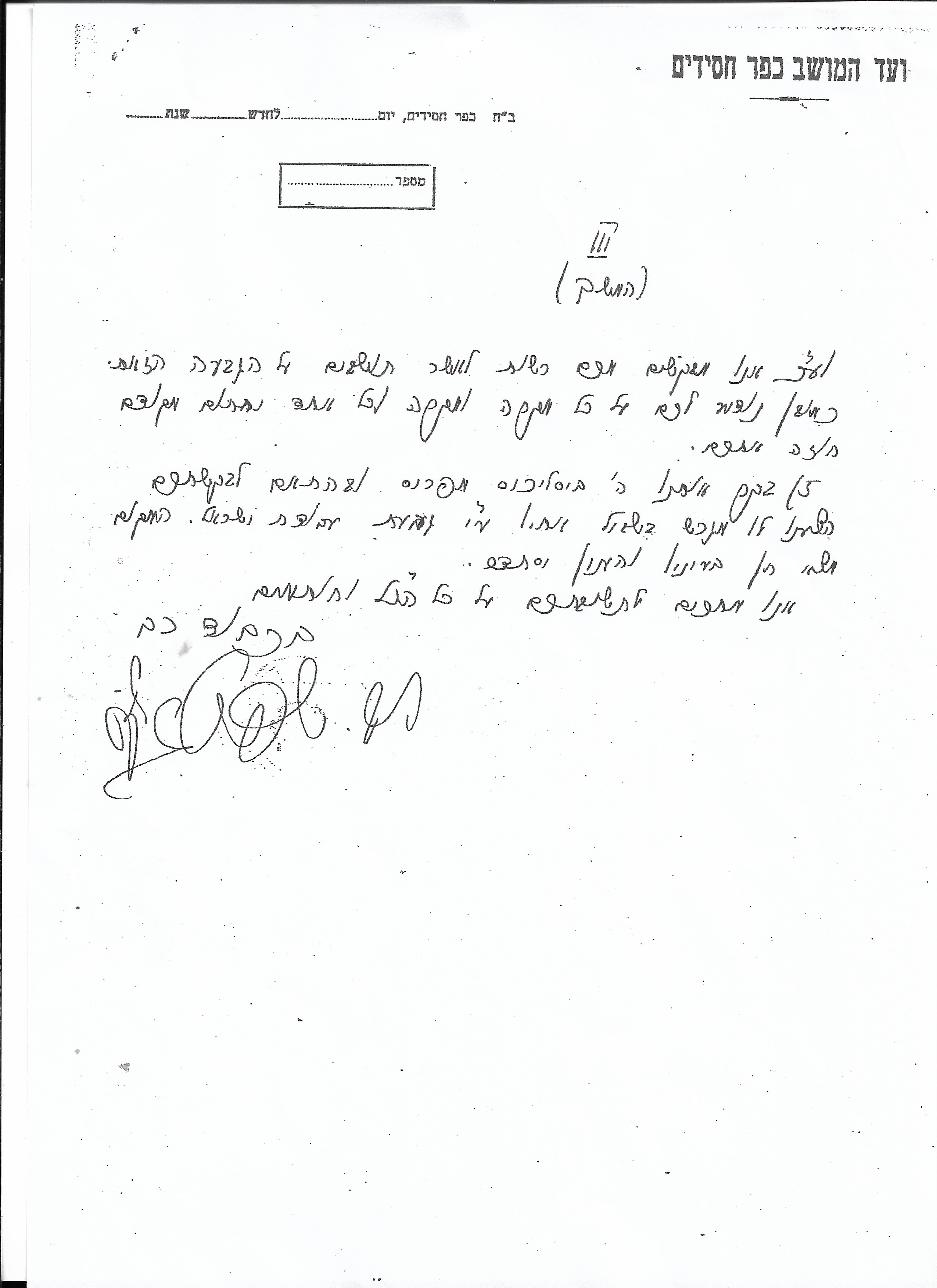 המשך המכתב